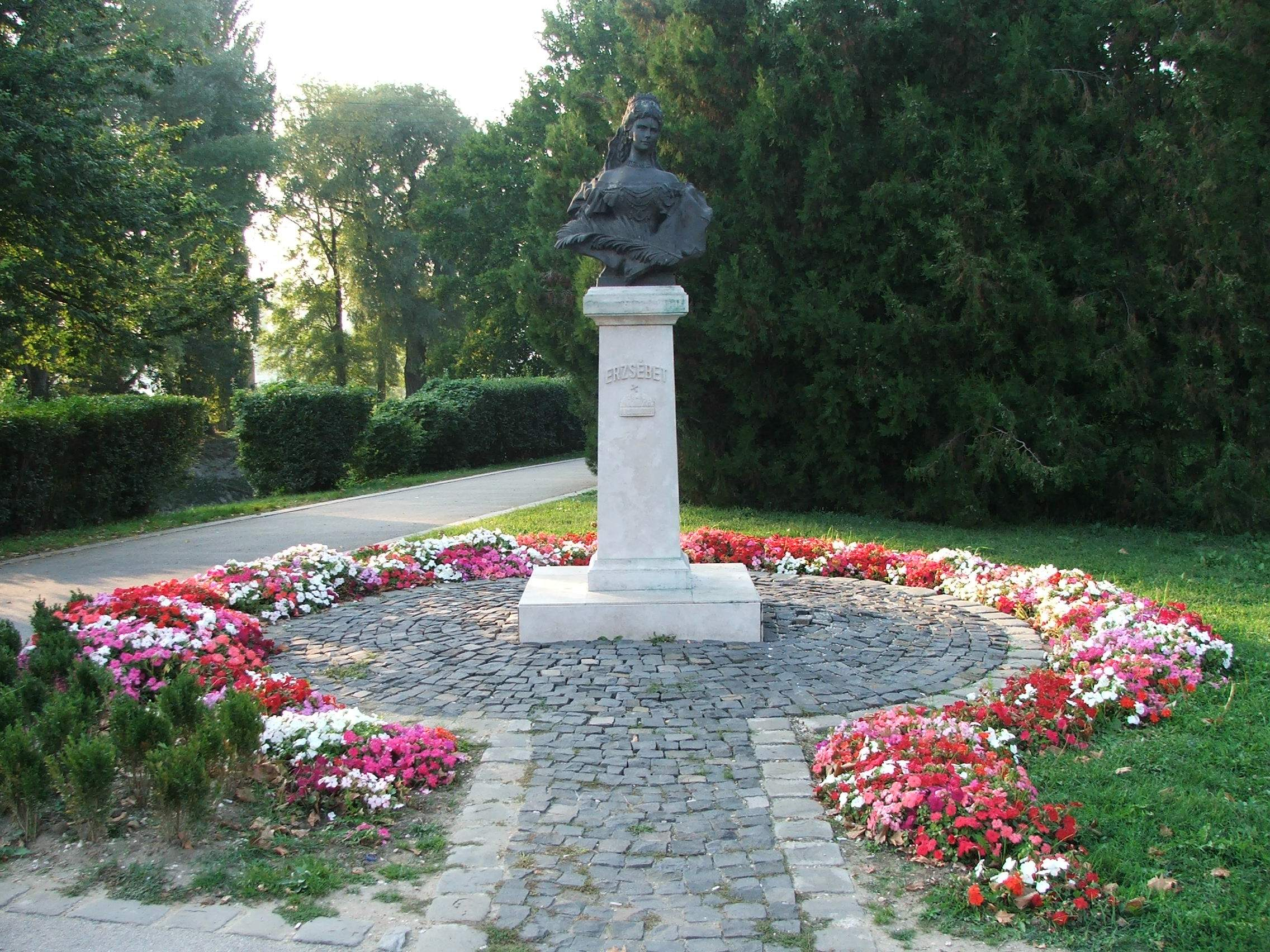 Statue in Erzsébet park. Esztergom, Hungary